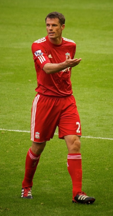 Liverpool vs Bolton 27/08/2011